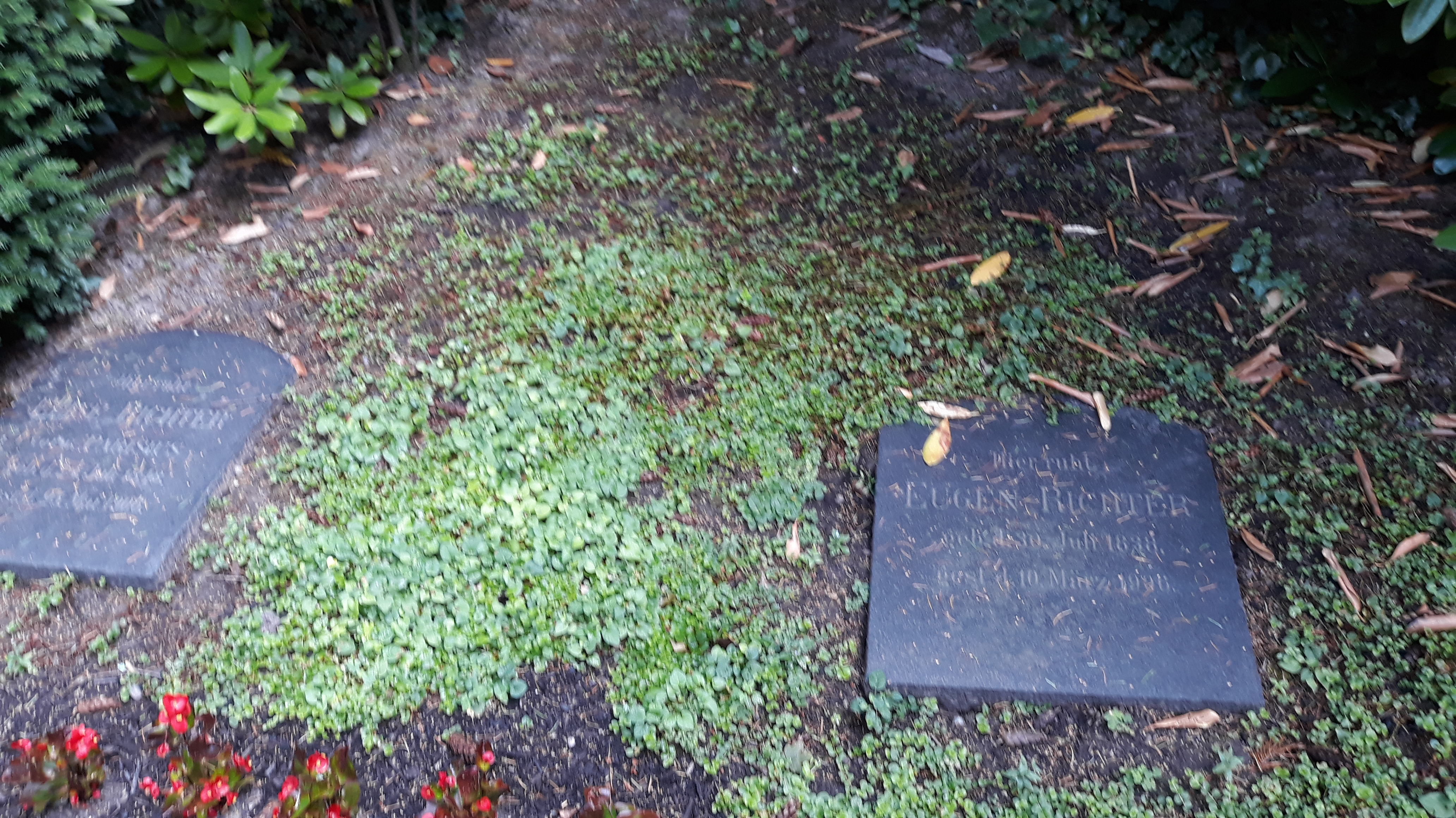 Das Grab des deutschen Politikers Eugen Richter und seiner Ehefrau Elise (verwitwete Parisius) auf dem Friedhof Delstern in Hagen.